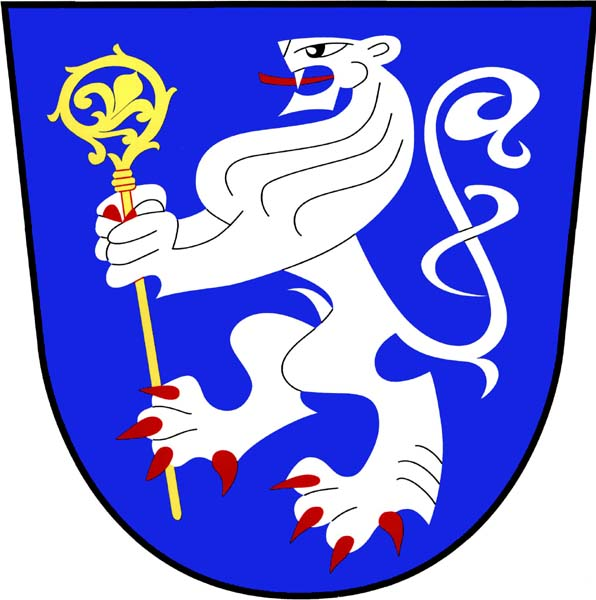 Znak obce Všechovice v okrese Brno-venkov